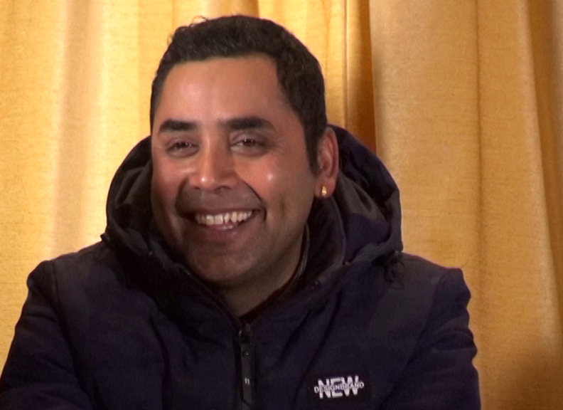 नेपाली: गायक तथा संगीतकार कालीप्रसाद बाँसकोटा